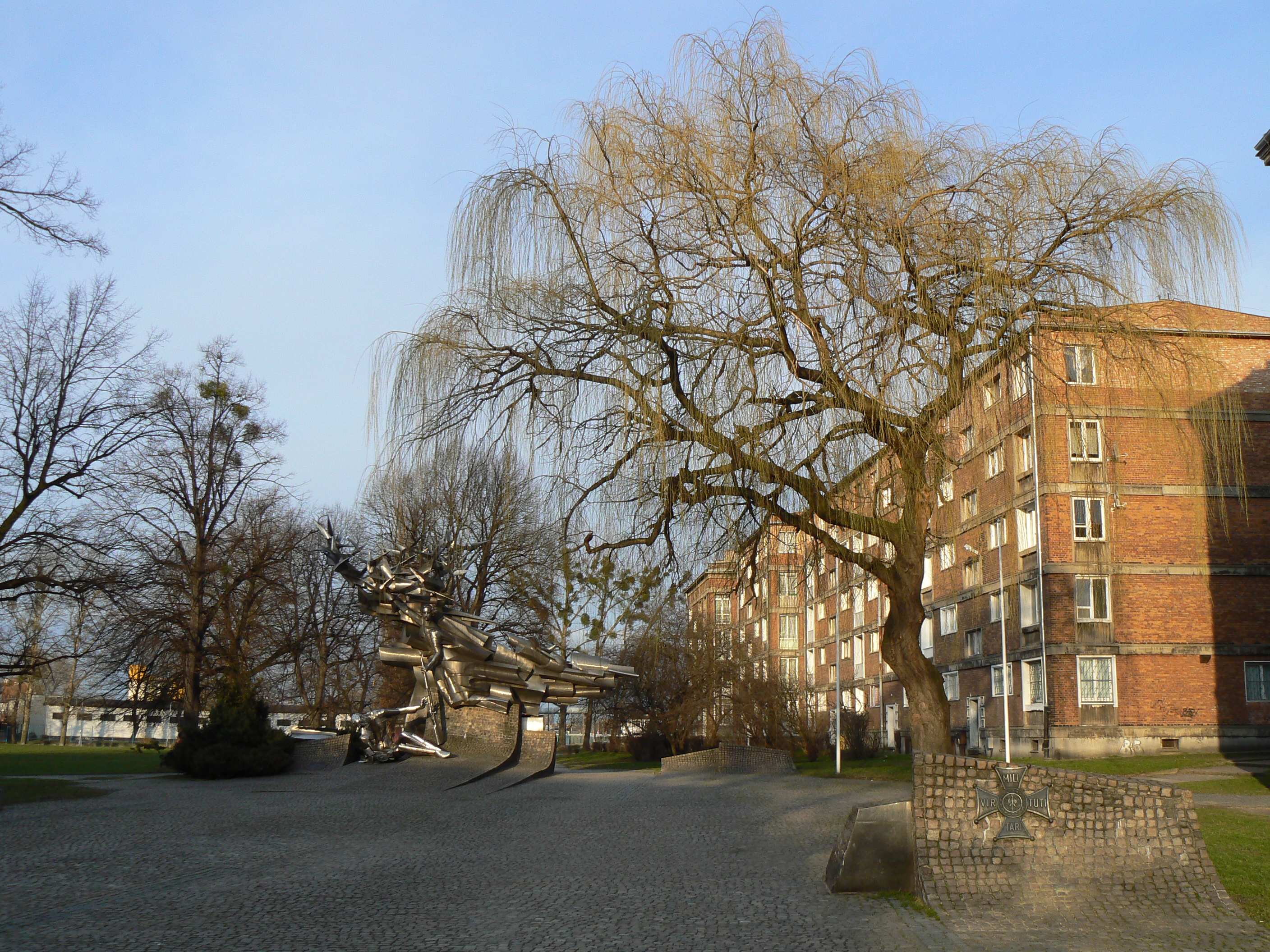 Pomnik Obrońców Poczty Polskiej. Obok order Virtuti Militari